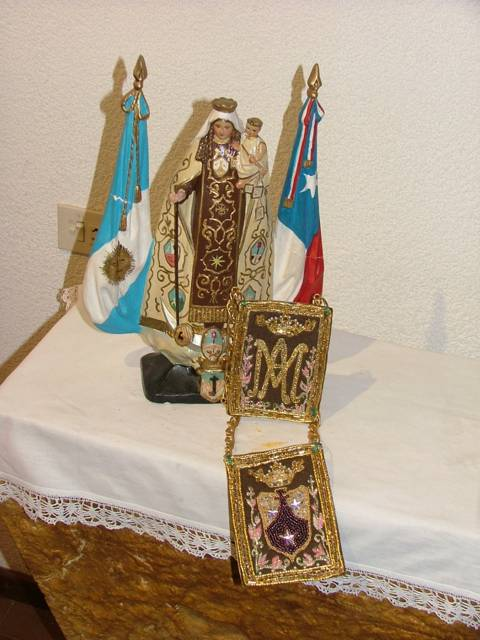 Fotografía de la Virgen y el escapulario